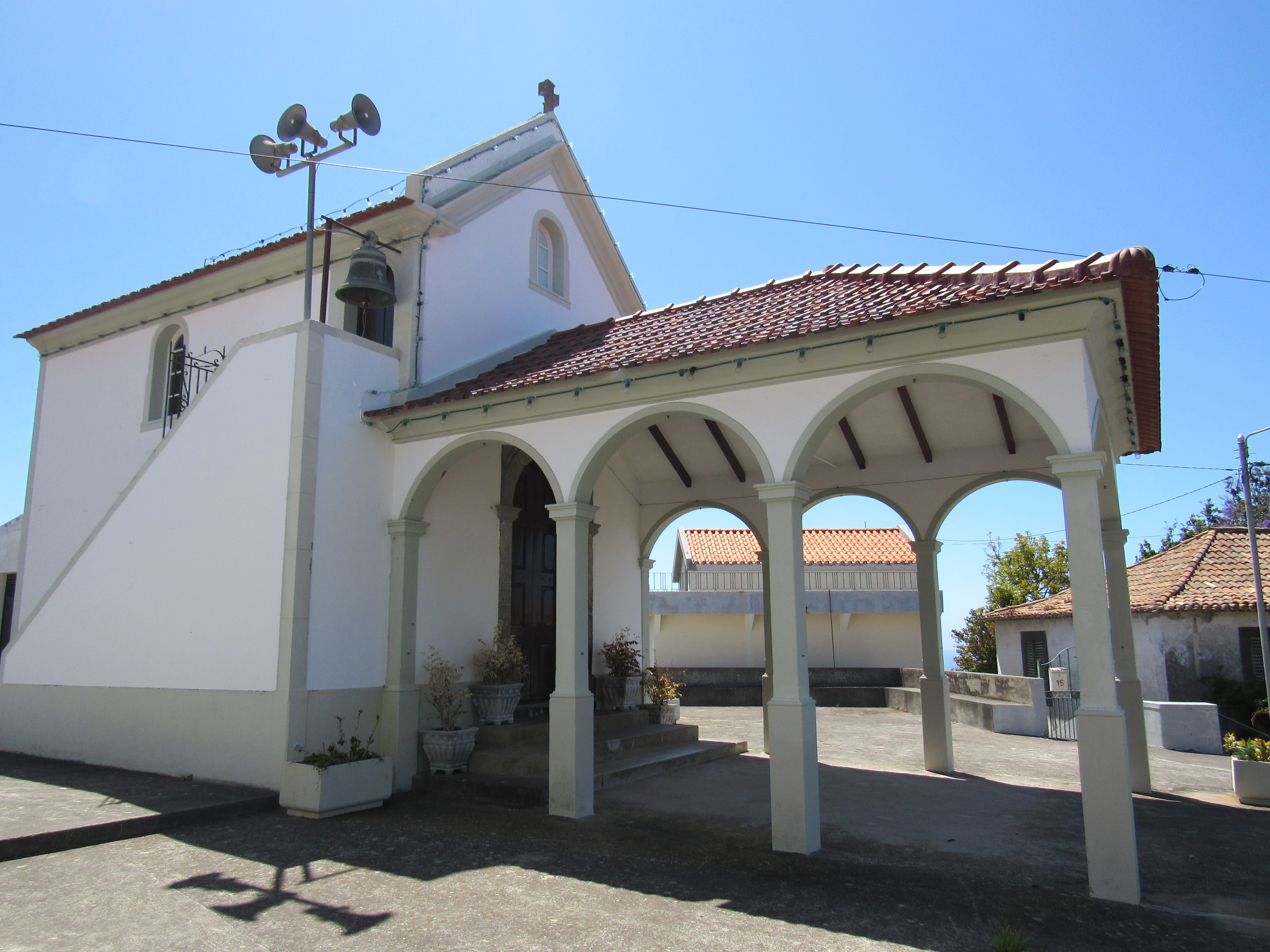 Capela de Nossa senhora do Livramento situada no sítio do Livramento - Ponta do Sol